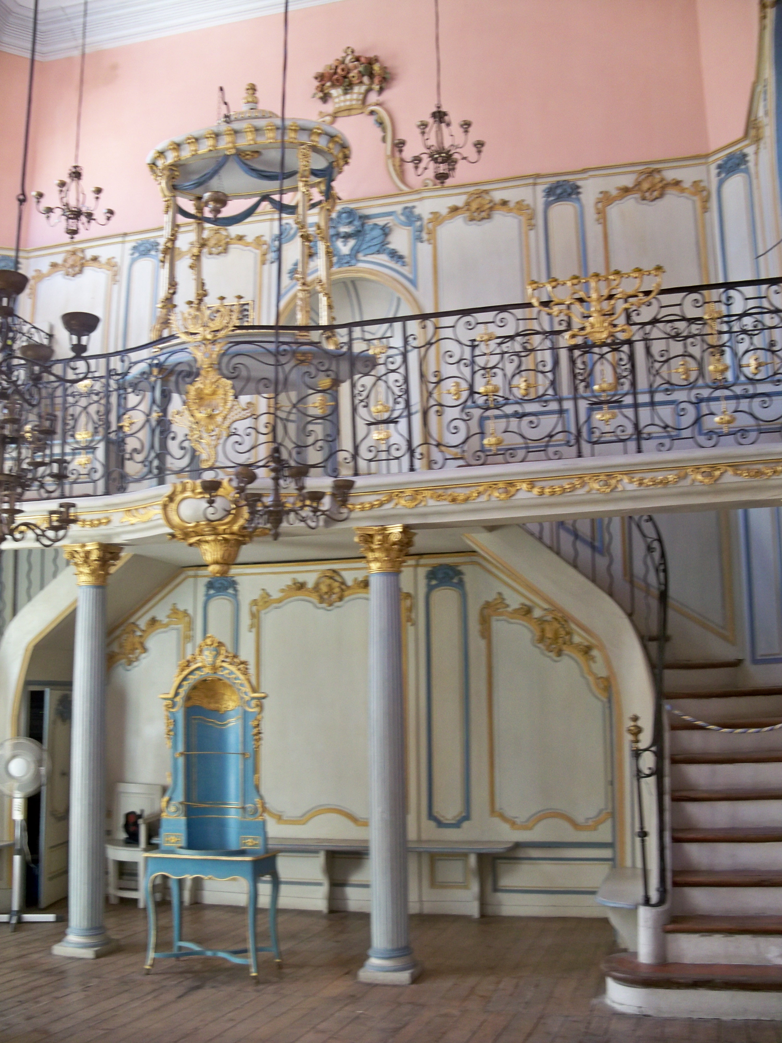 Intérieur de la synagogue de Cavaillon, Vaucluse, France. Au rez-de-chaussée, pupitre de la Torah, en bleu et or.